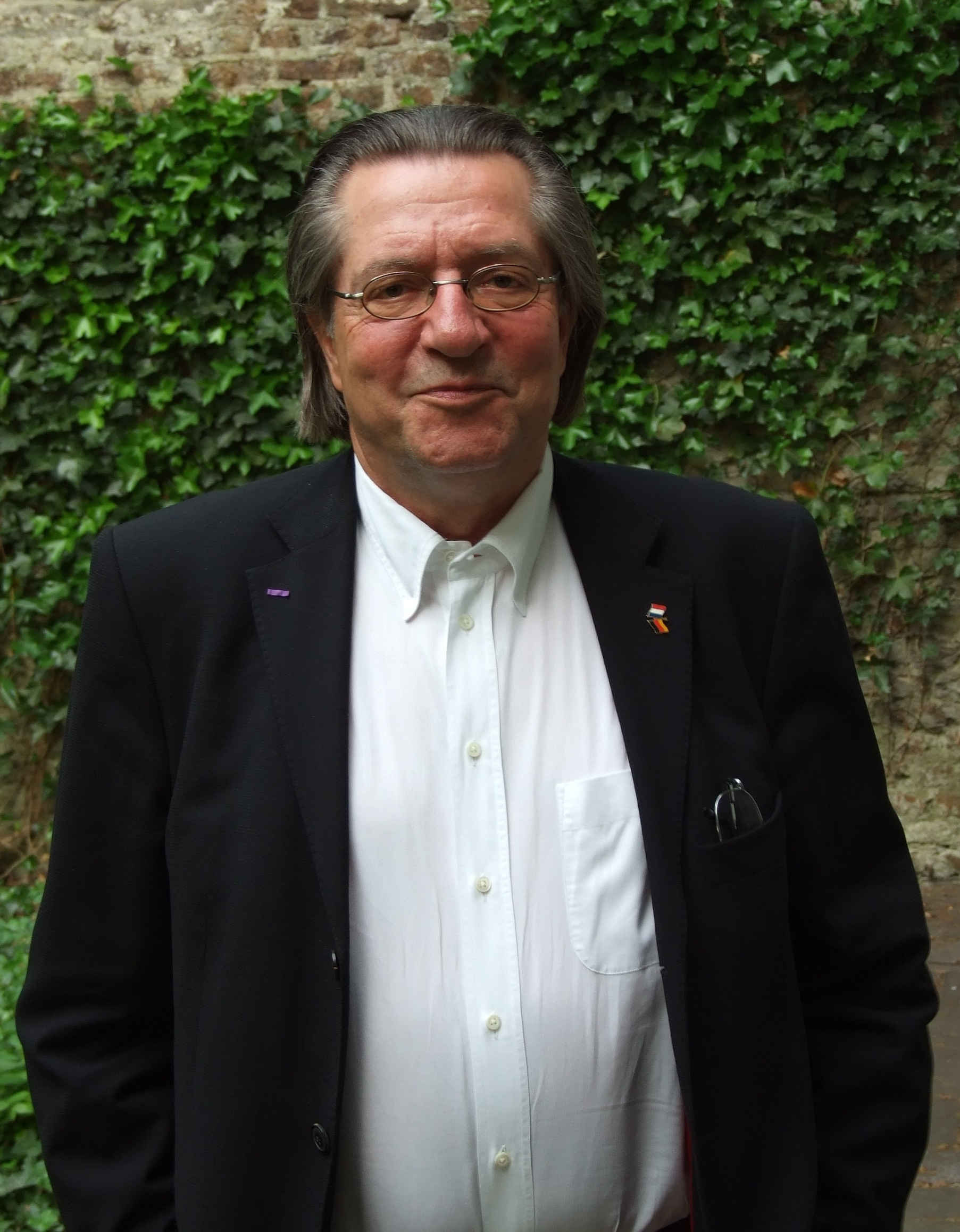 Wolf Steinsieck, deutscher Romanist